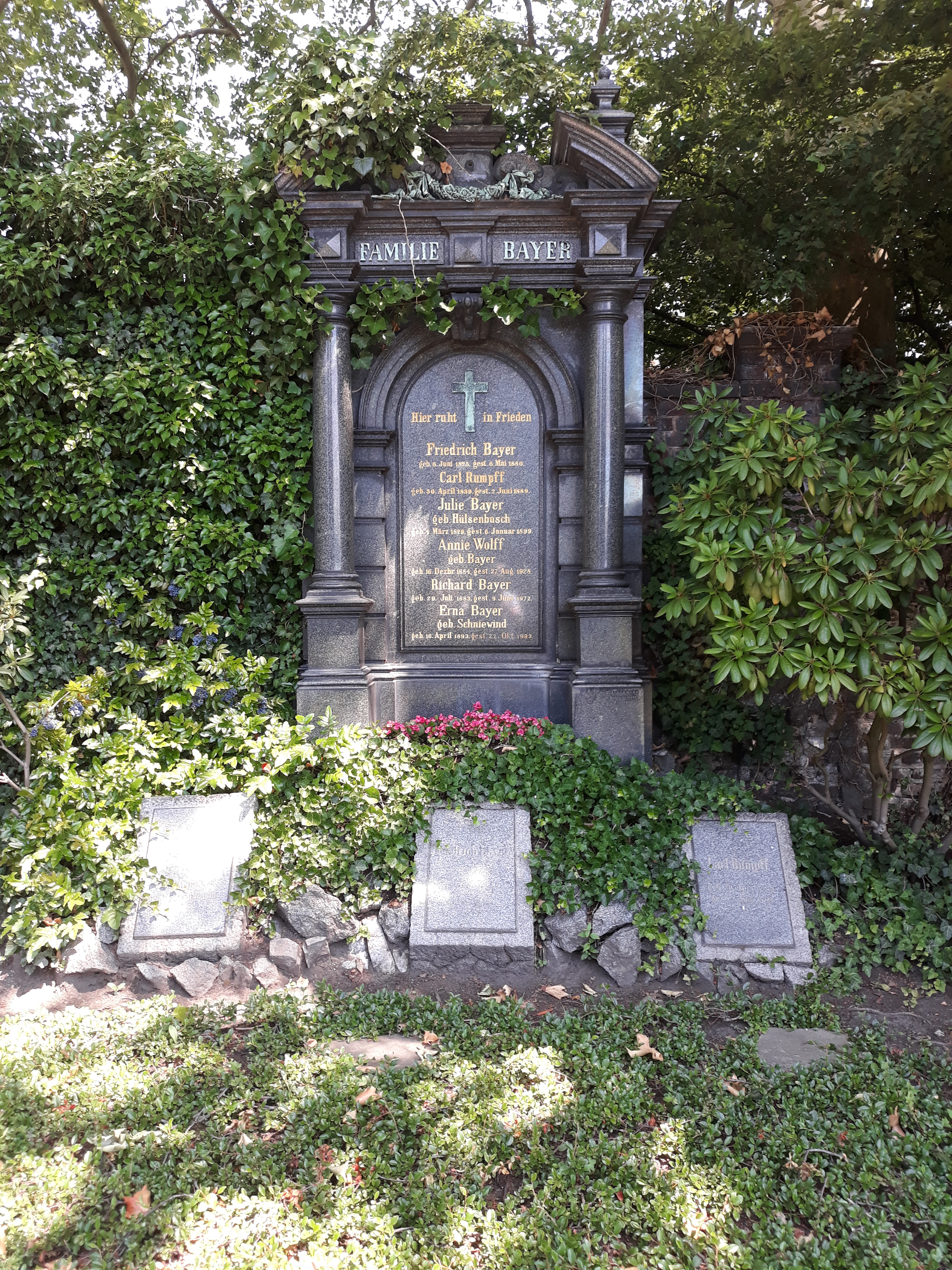 Das Famileingrab der Industriellenfamilie (Chemie) Bayer, darunter Friedrich Bayer, auf dem Lutherischen Friedhof Hochstraße in Wuppertal-Elberfeld.